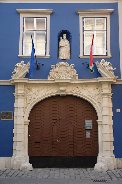 Sopron, Templom u. 2, 9400